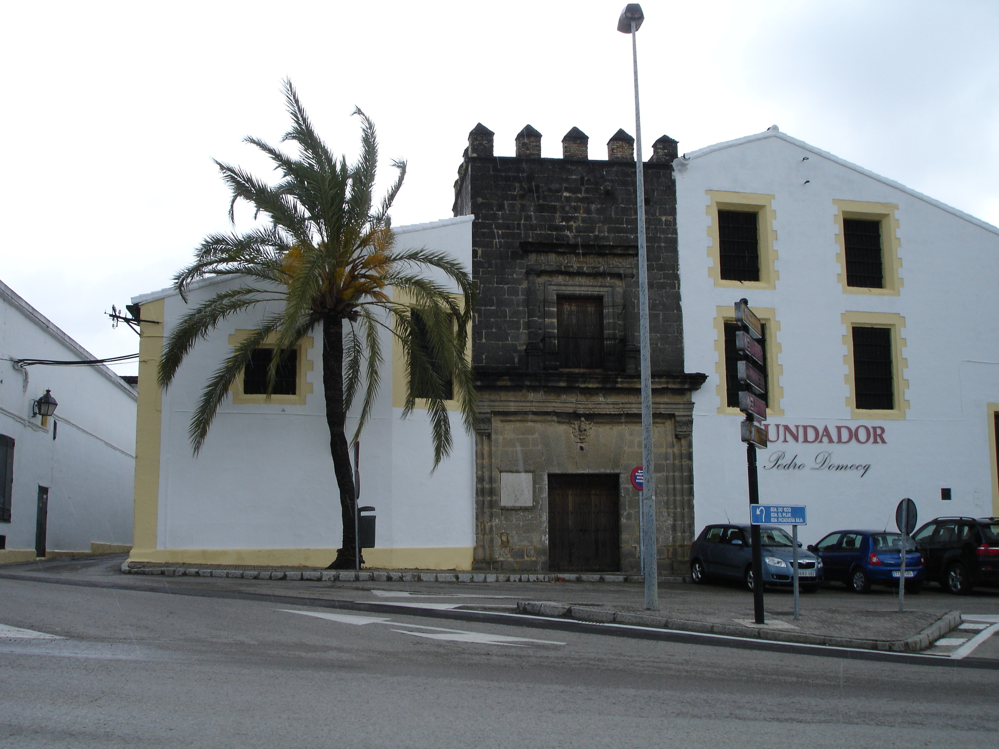 Bodegas Domecq con torre de la muralla (conocida como "Torre de Riquelme"), Jerez (Spain).